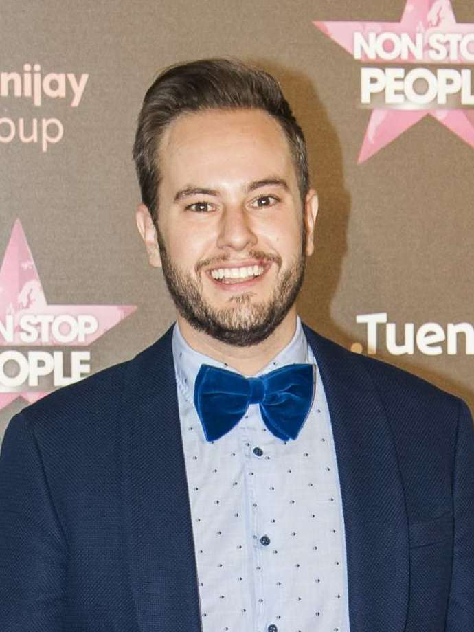 Fotos del photocall y fiesta de lanzamiento de un nuevo canal de televisión en España.